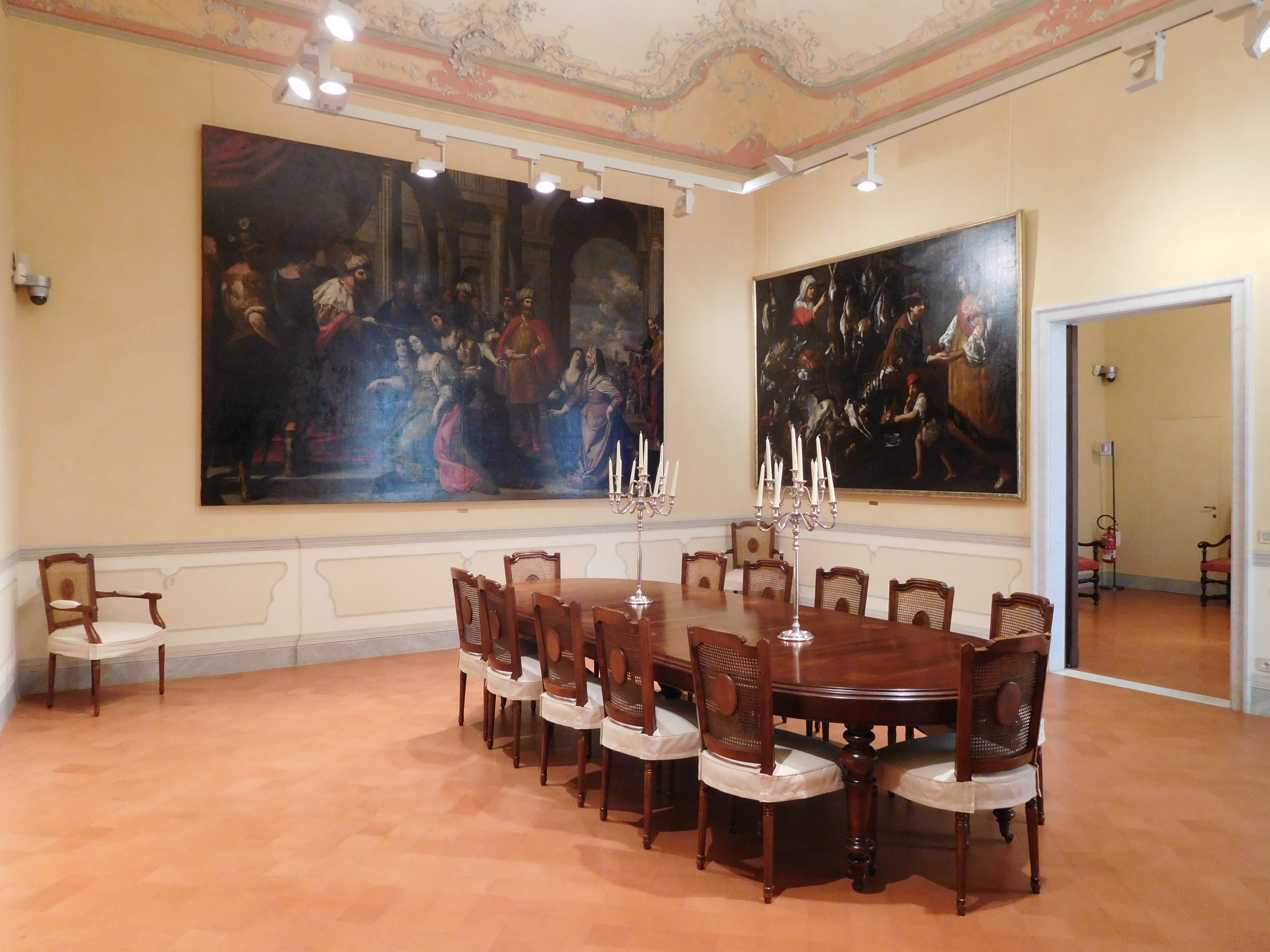 Palazzo Doria-Carcassi, Via Chiossone, Genova, Italia